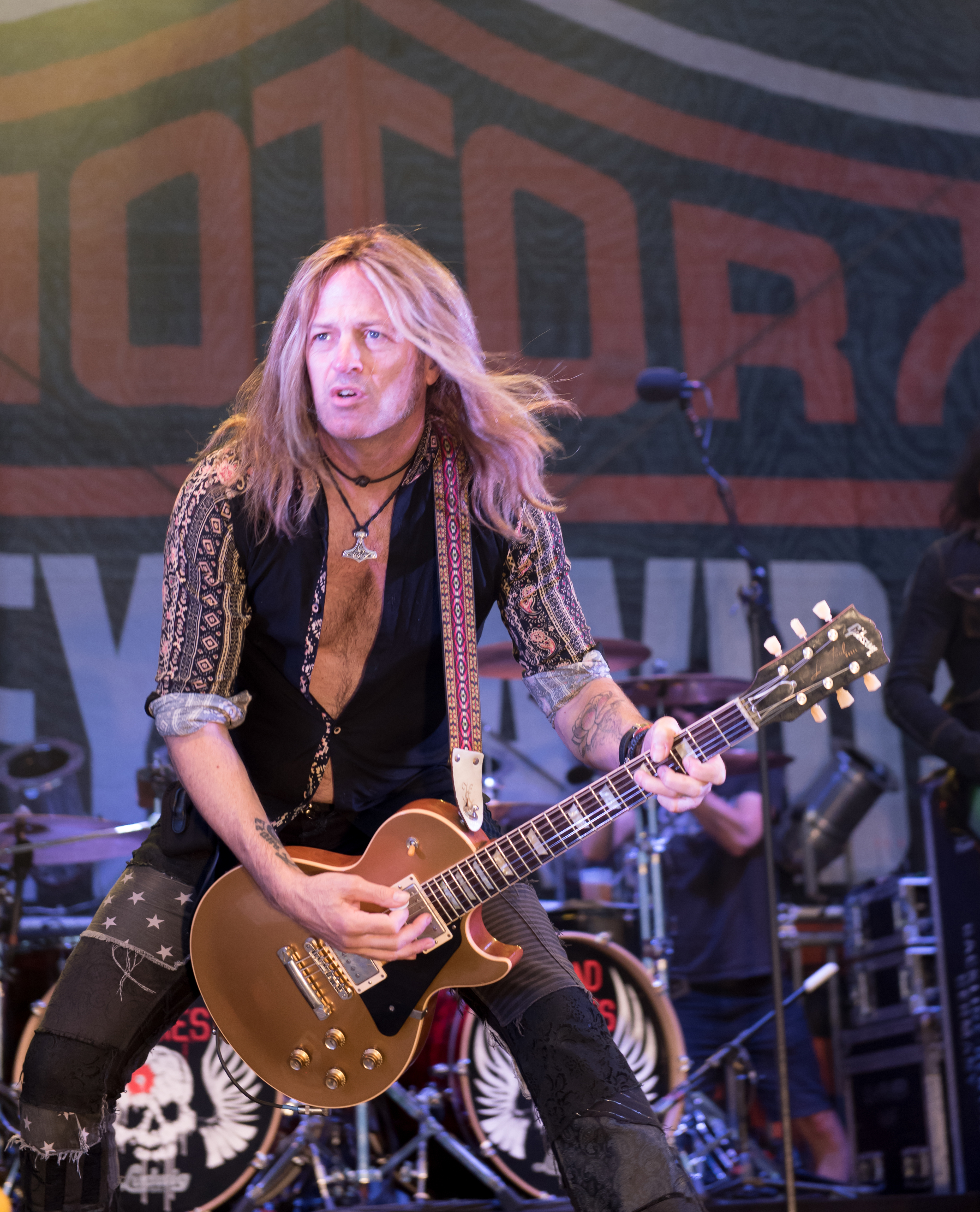 The Dead Daisies bei den Hamburg Harley Days 2017